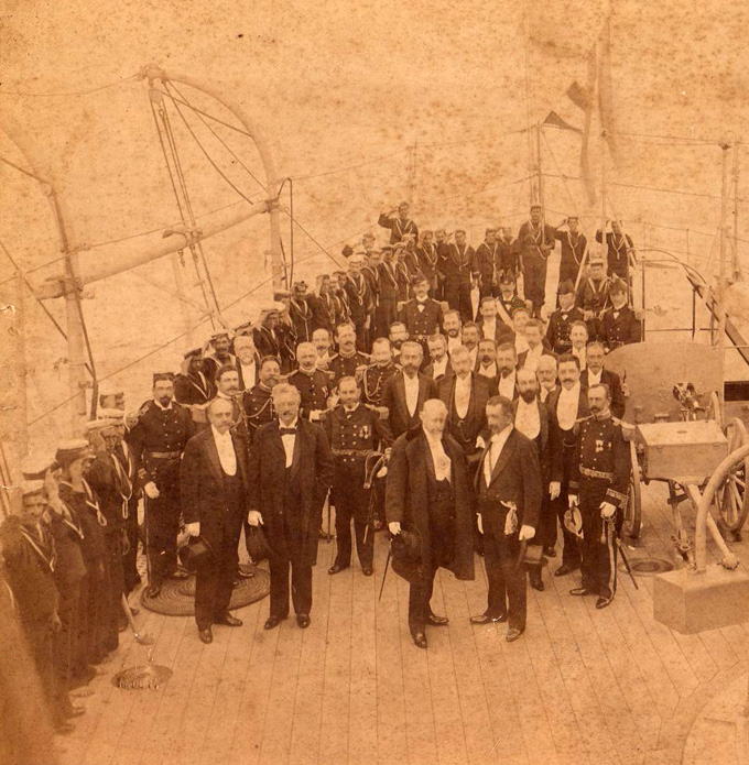 Los presidentes Julio A. Roca (Argentina) y Federico Errázuriz Echaurren (Chile) se reúnen en el Estrecho de Magallanes en 1899, encuentro llamado "El Abrazo del Estrecho"